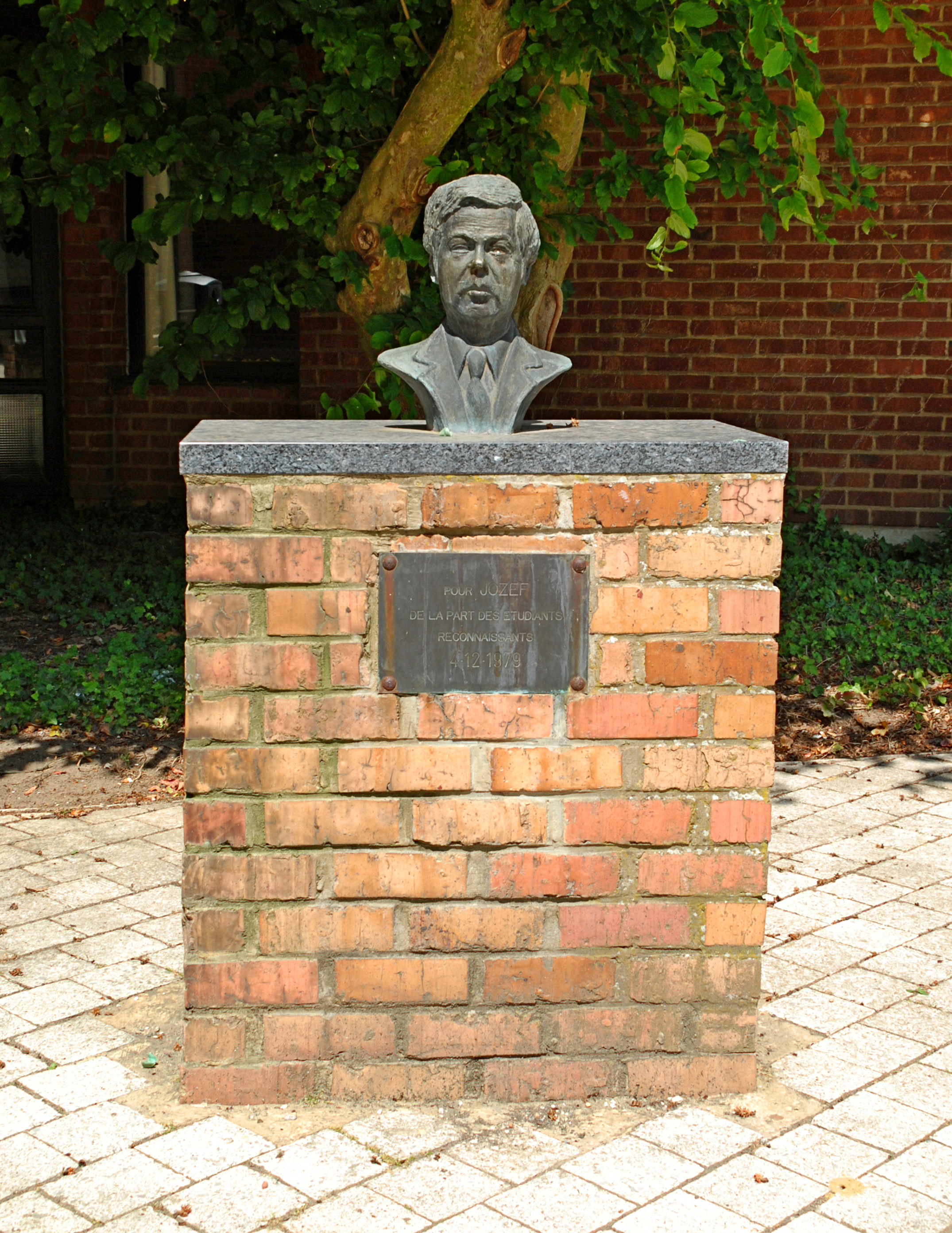 Belgique - Brabant wallon - Louvain-la-Neuve - Place Sainte-Barbe : Pour Jozef - 1979 This photo of immovable heritage has been taken in the Walloon Region